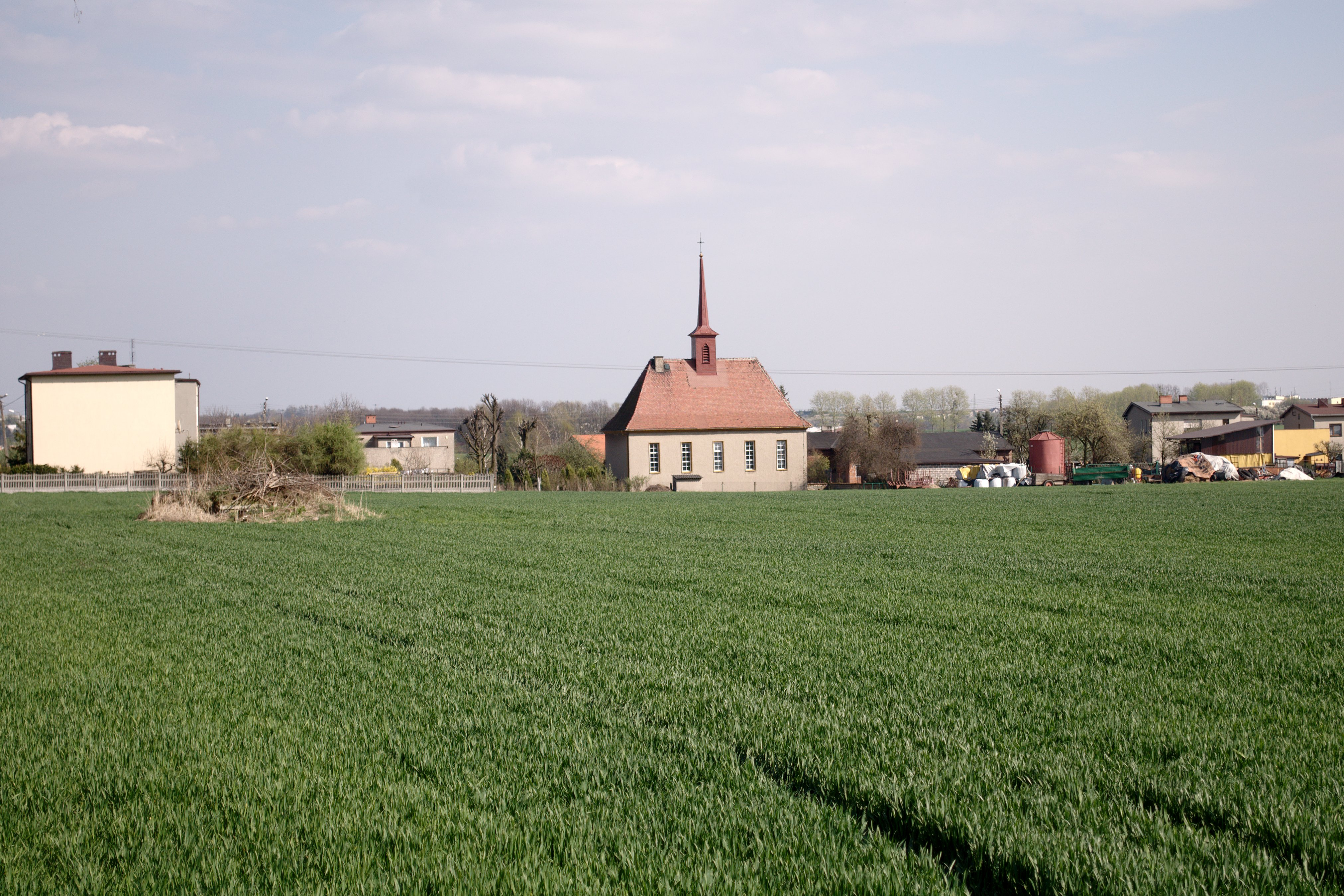 Laryszów.